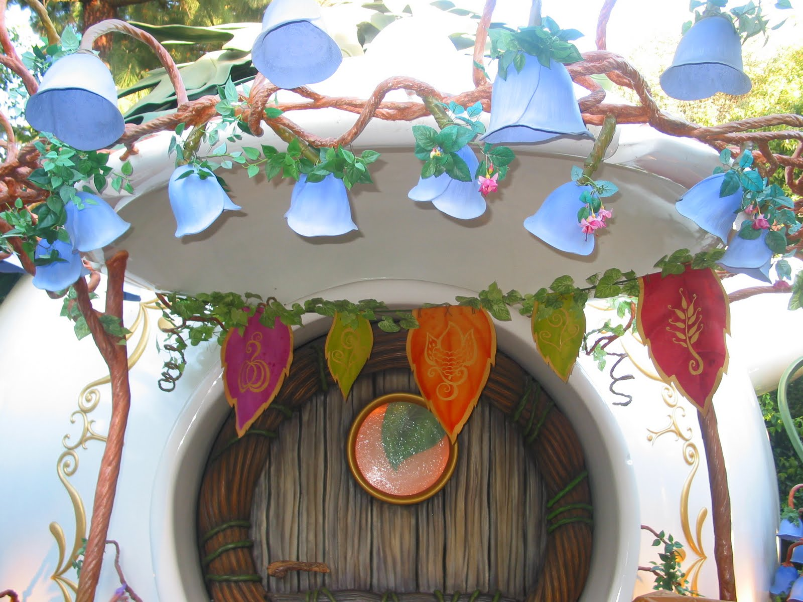 Tinker Bell House in Pixie Hollow